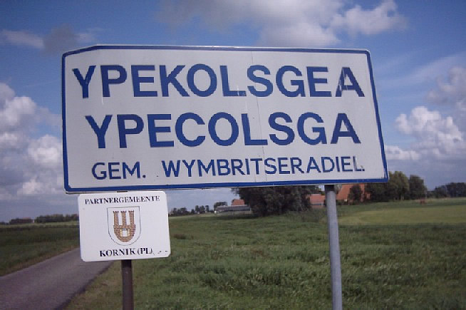 Plaatnaanbord van Ypecolsga categorie:Afbeelding plaatsnaambord